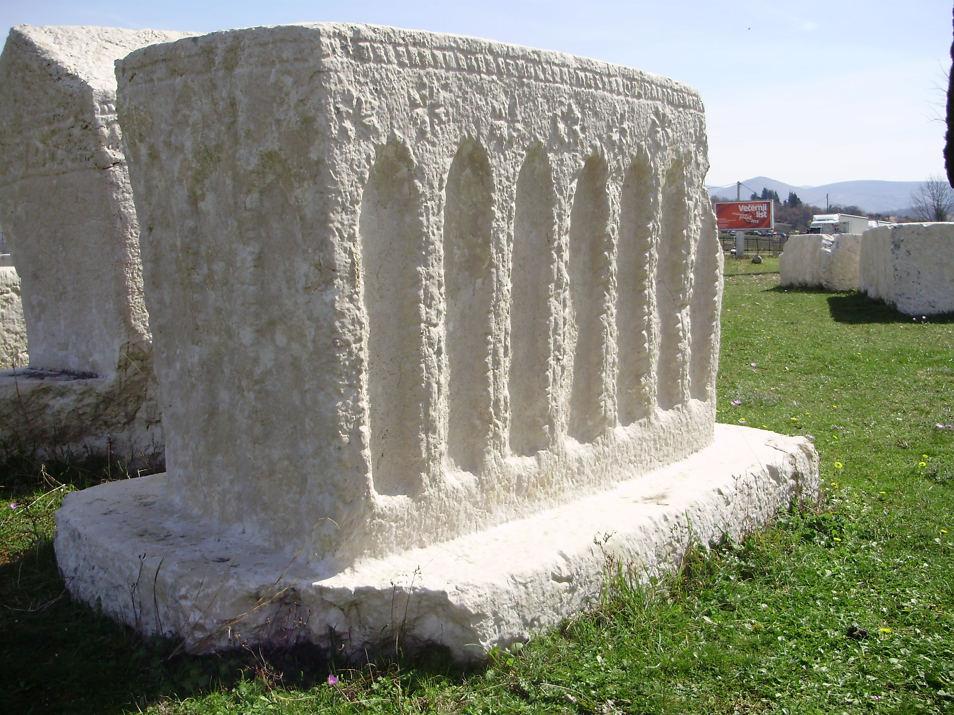 Medieval tombstone